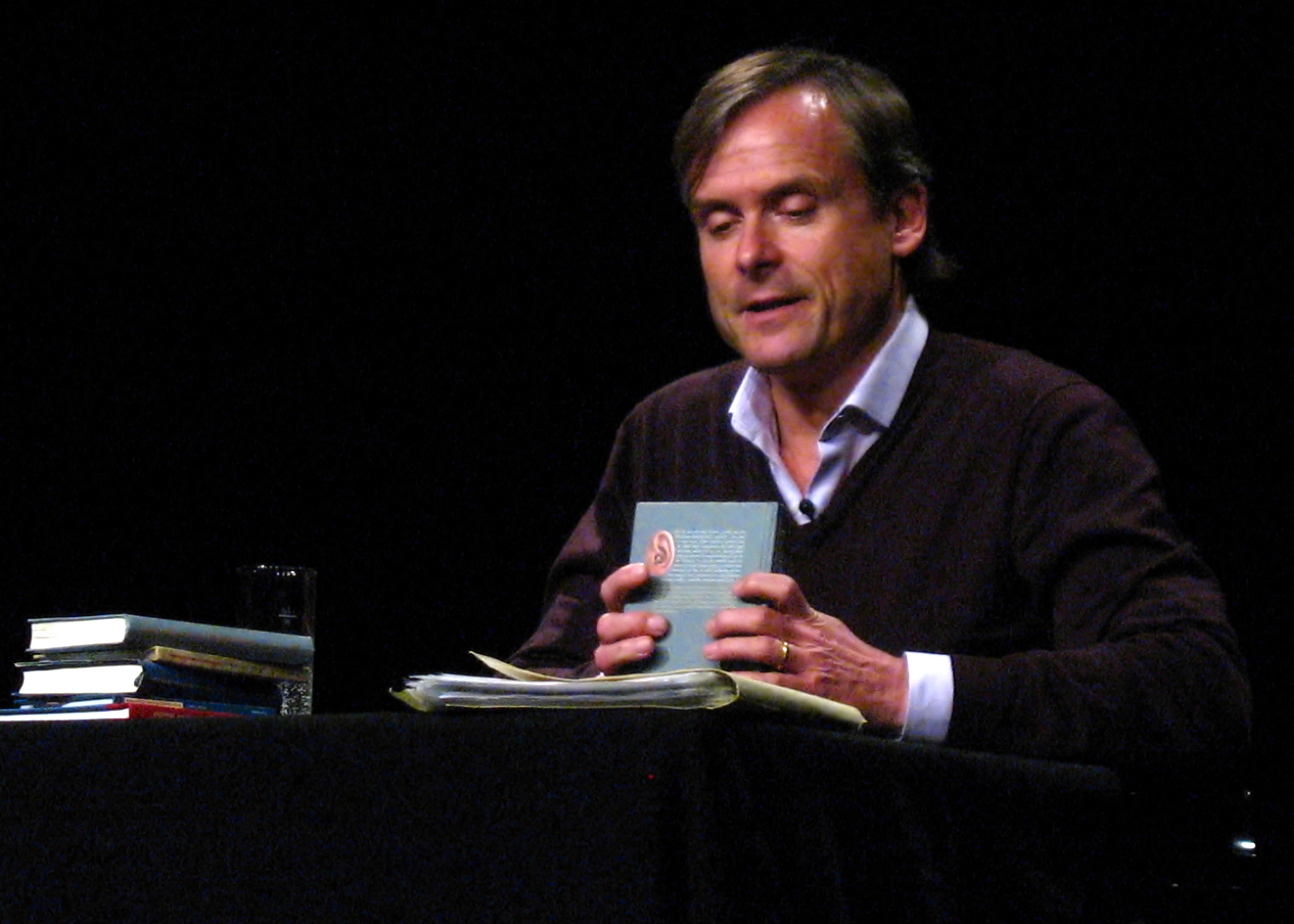 Axel Hacke, Lesung November 2009, Lustspielhaus, München-Schwabing